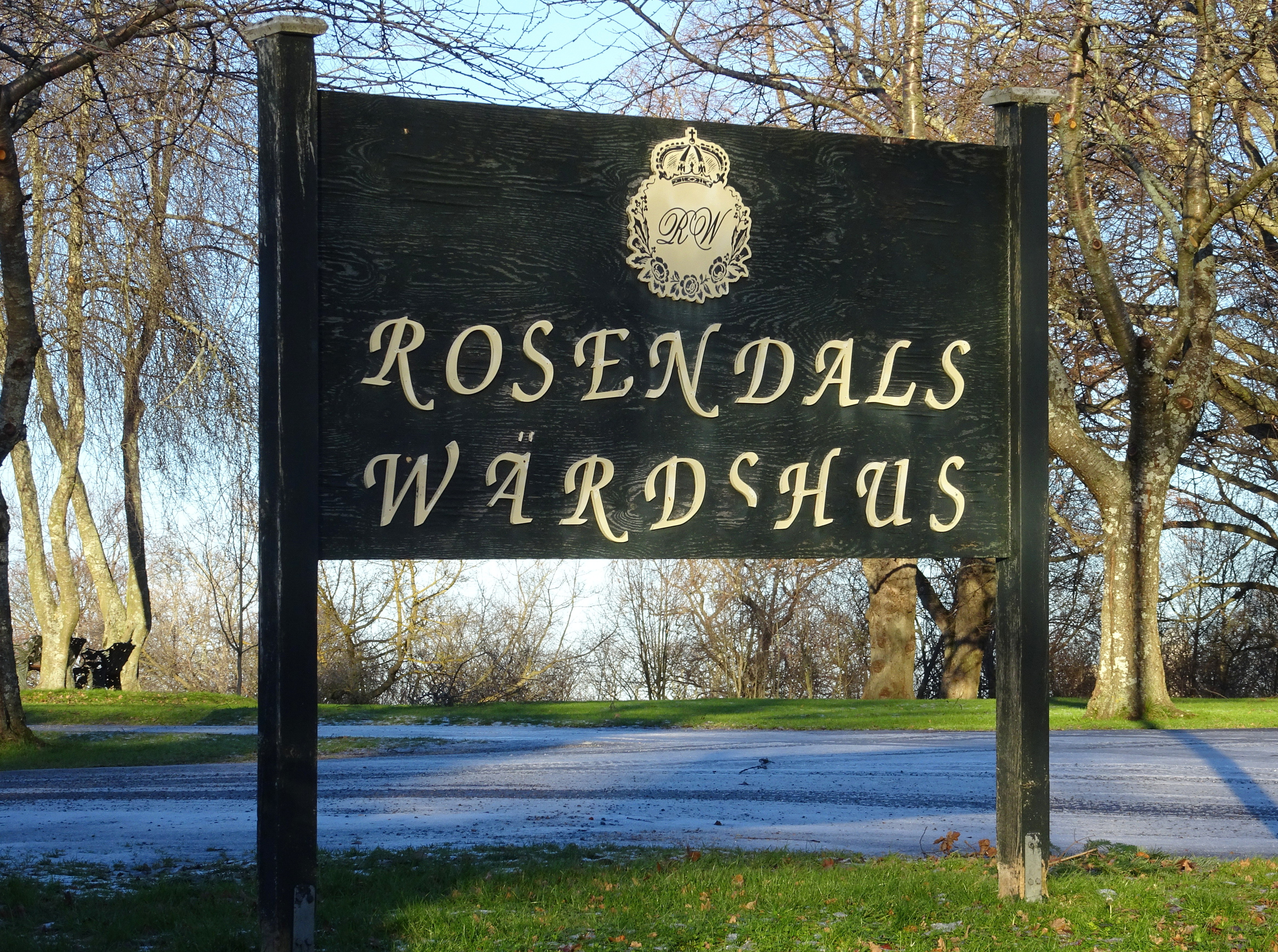 Rosendals värdshus på Södra Djurdården